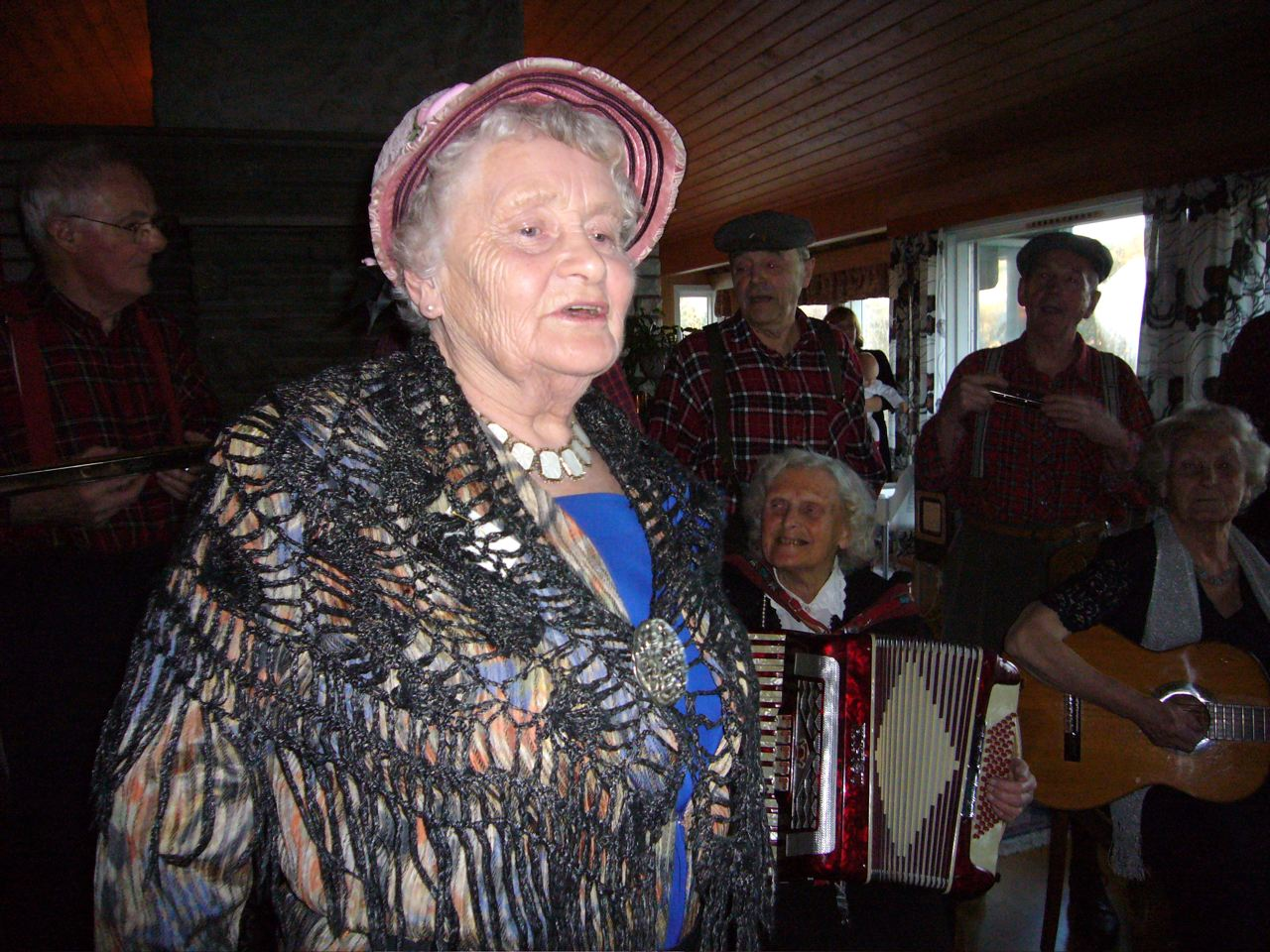 Ågoth Lilleheil er frontfigur i Bergensbandet Kanuttene. Her fotografert under et fellesnummer mellom Kanuttene og Bergen Munnspillorkester “2007-03-31”.